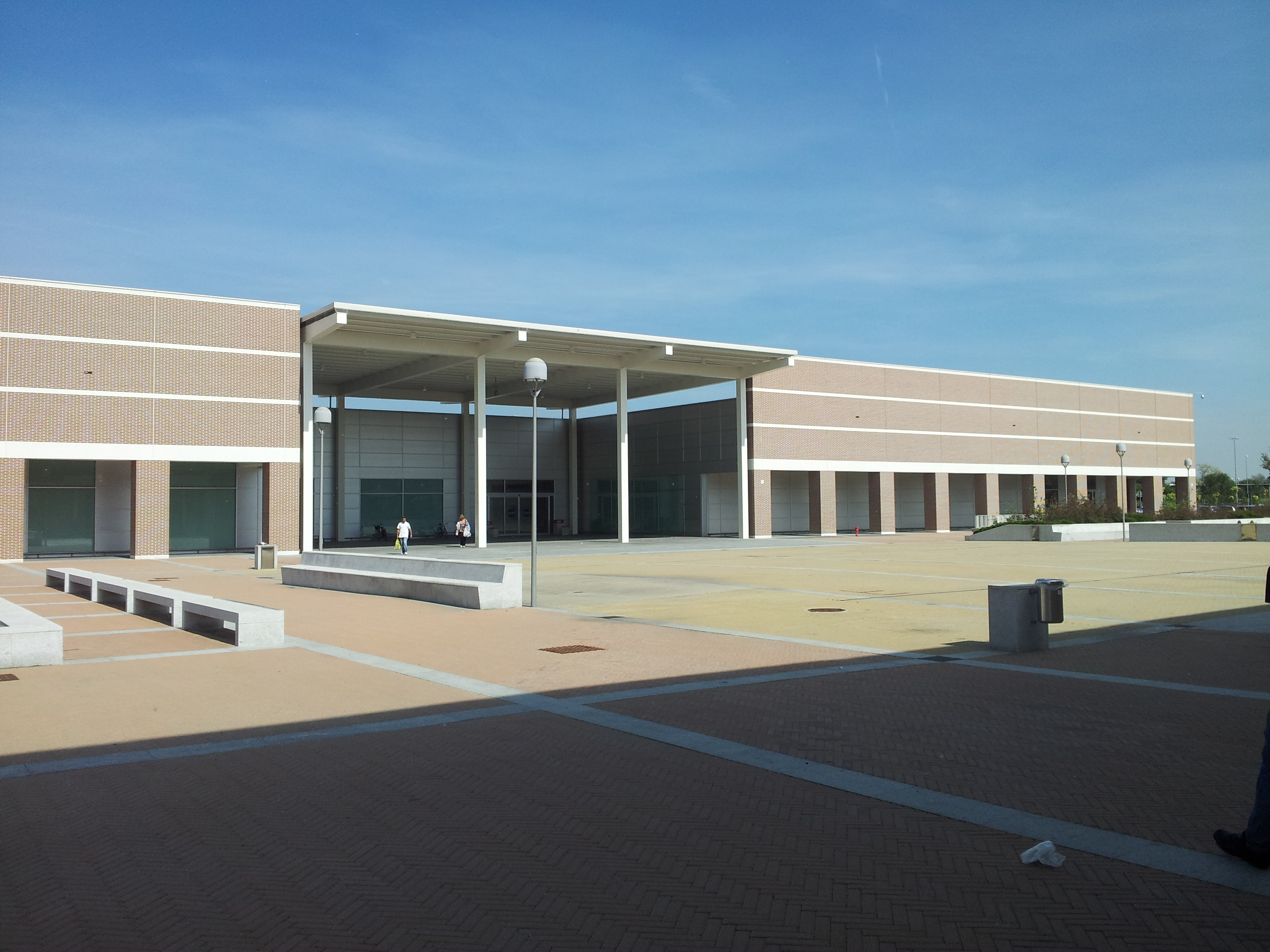 moderna komunumocentra vendejaro en Rivalta di Torino, Italio